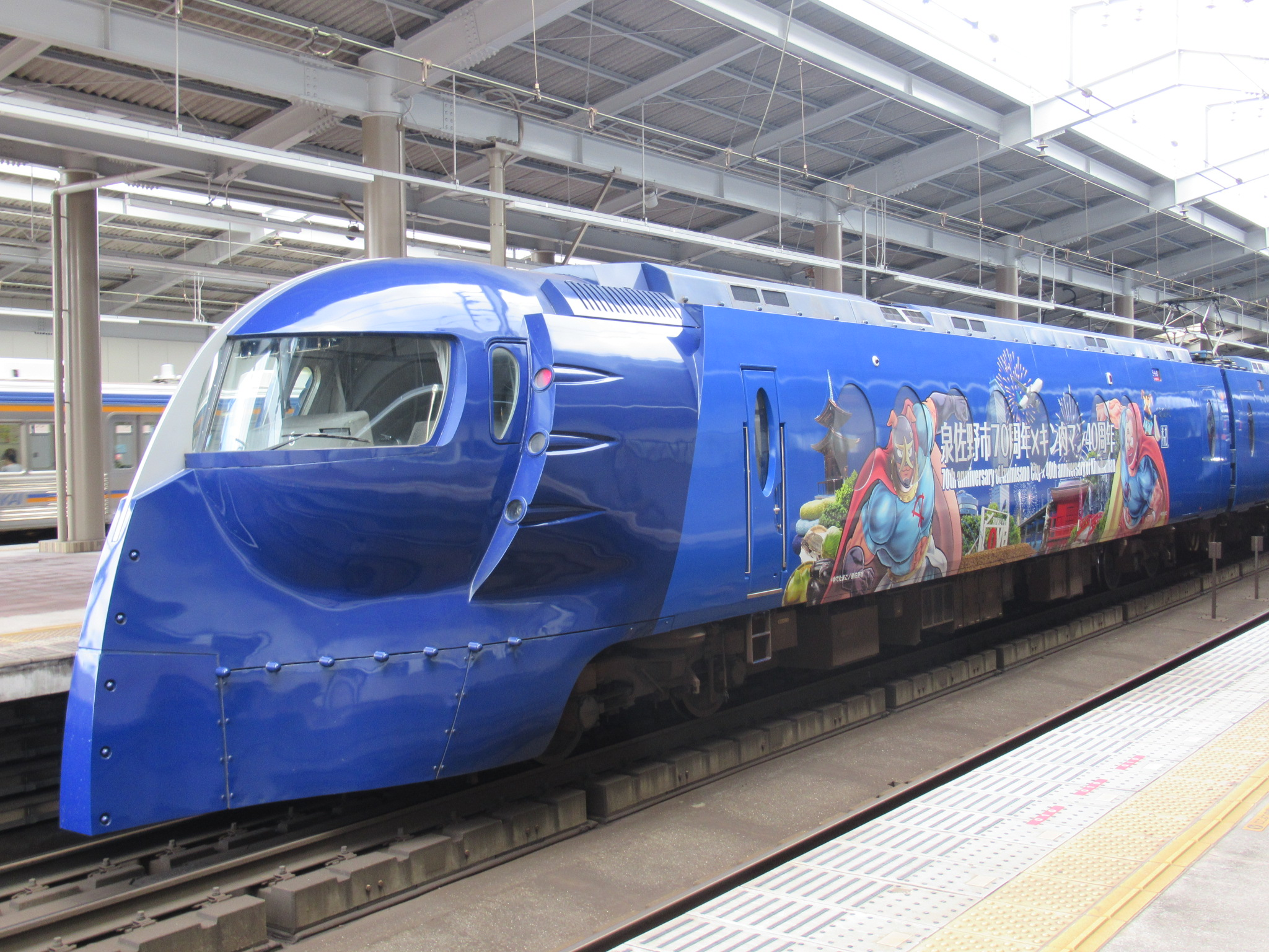 南海50506「泉佐野市70周年 × キン肉マン40周年 友情タッグラピート」